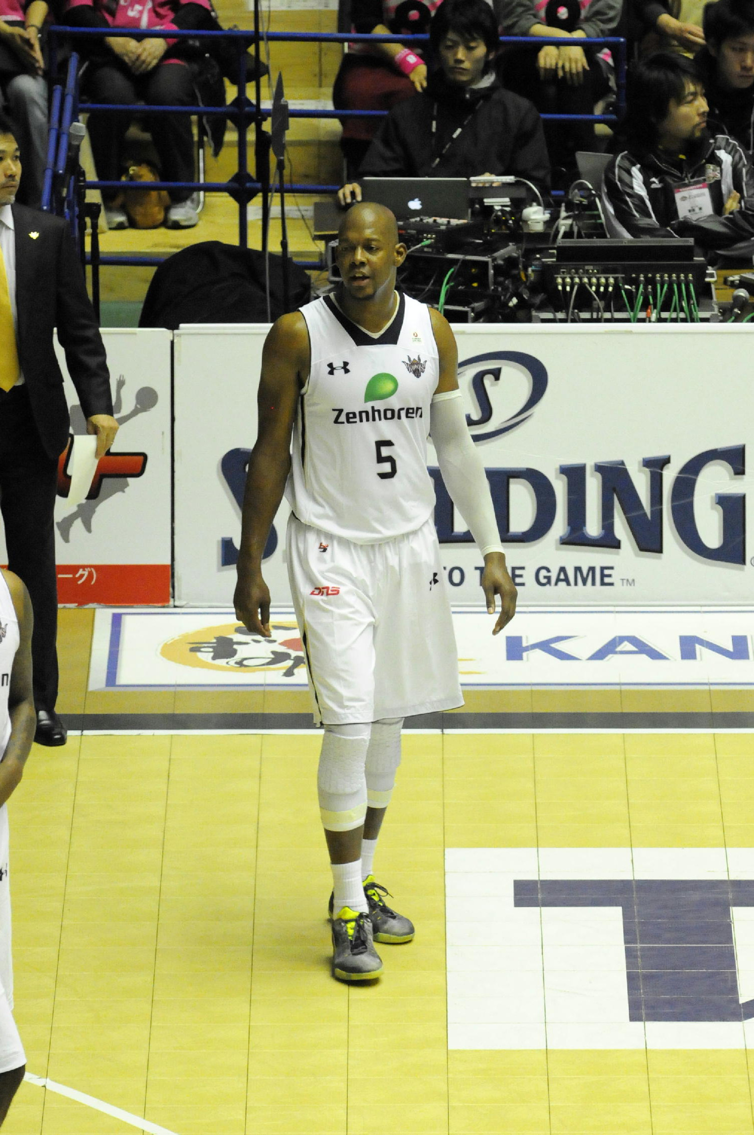 ｂｊリーグ 2013-2014シーズン プレイオフ ファイナルズ_024